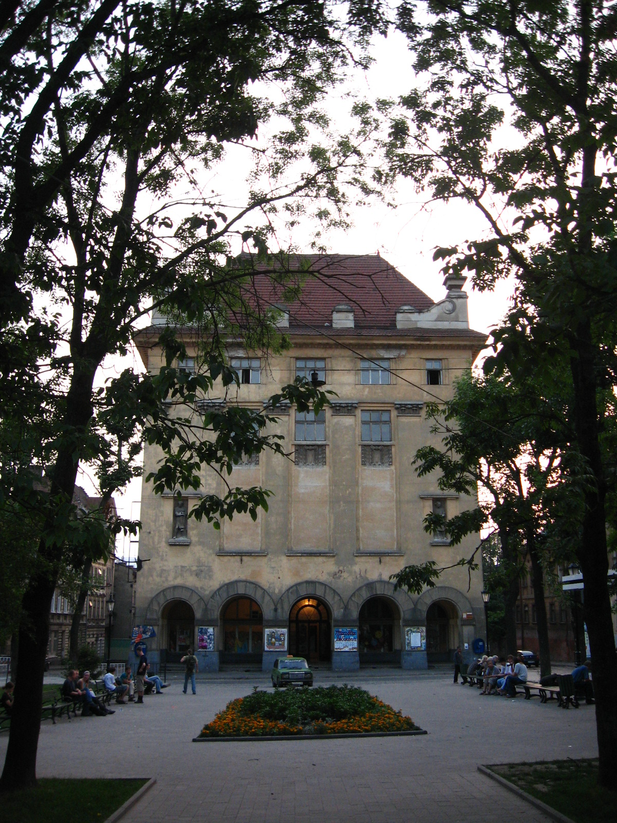 Кукольный театр во Львове